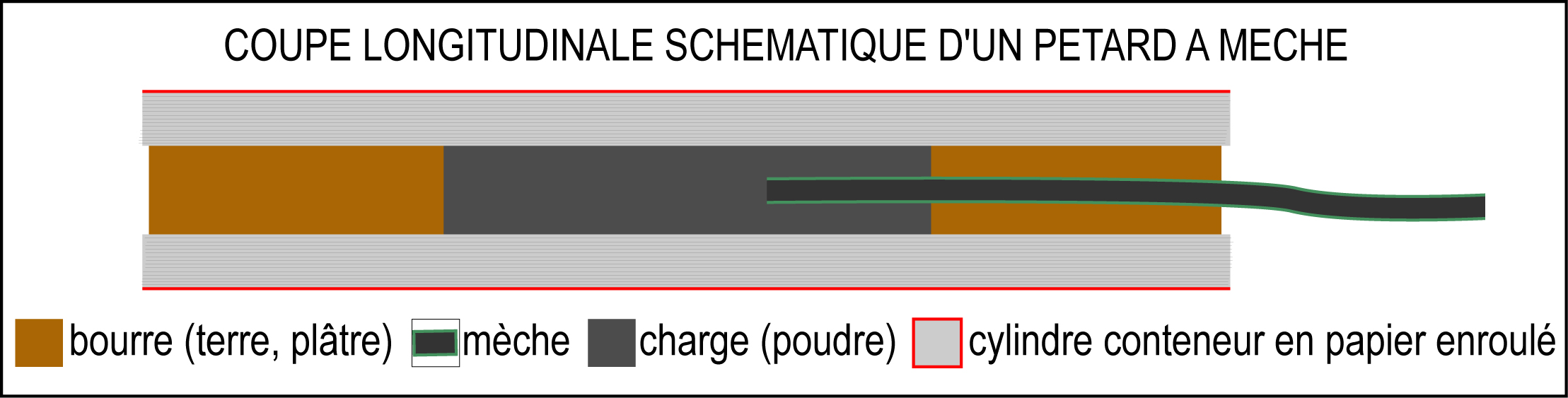 Coupe longitudinale schématique d'un pétard à mèche